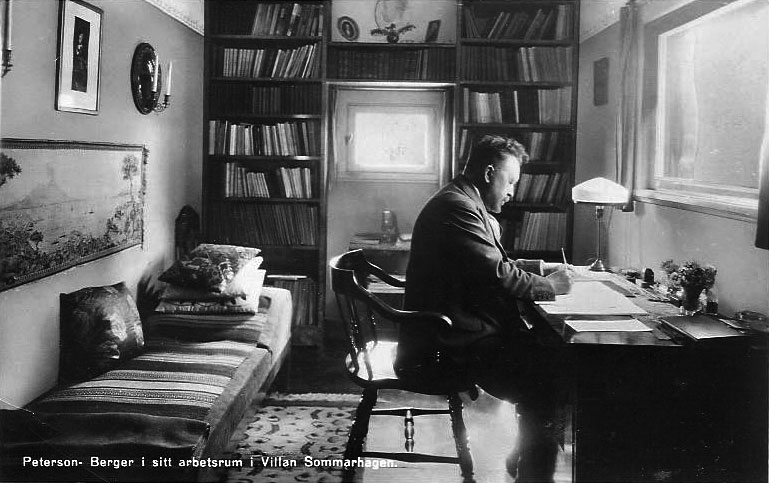 Wilhelm Peterson-Berger in his study, Villa Sommarhagen